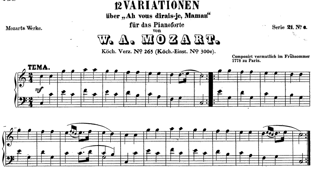 Mozart, thème du K 265